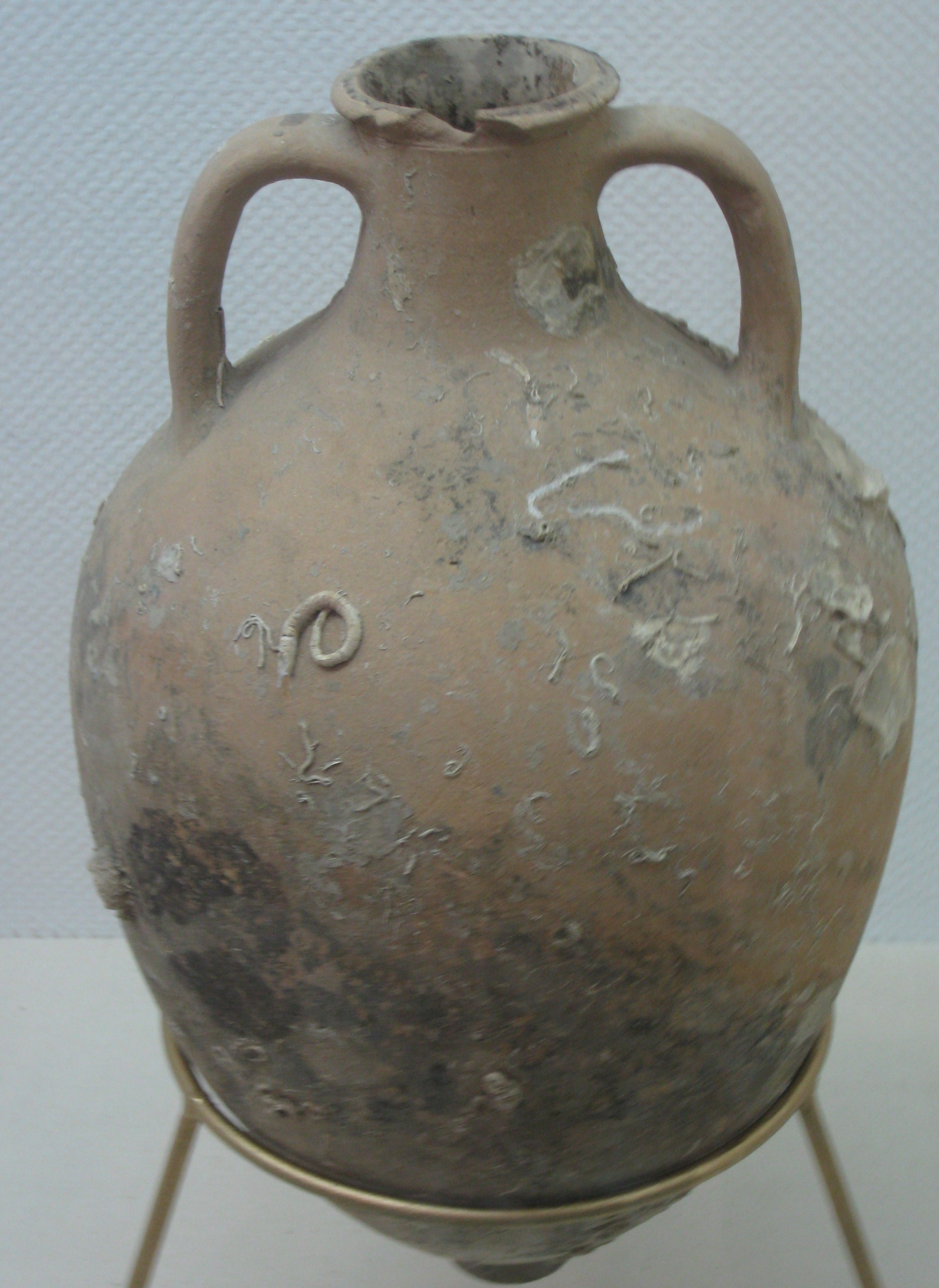 Wine Amphora, Potery. 5th Century BC. REcovered from the sea near Ashkelon. אמפורה (כד לאכסון יין) עשויה חרס. המאה החמישית לפנה"ס. נמשתה מן הים באשקלון.